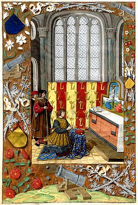 Louis XII en prière - enluminure - 1494 - page entière